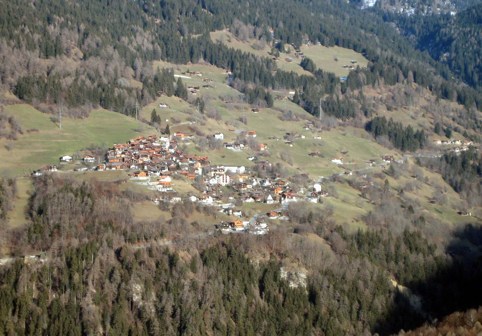 Maladers